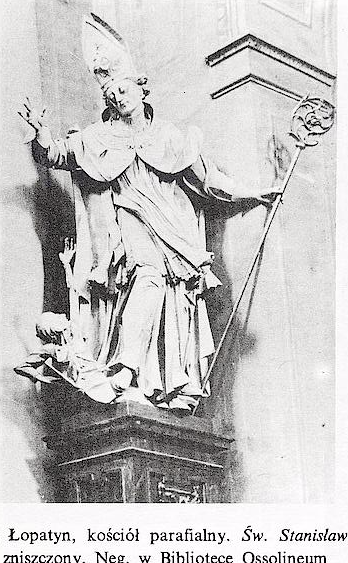 святий Станіслав, Лопатин